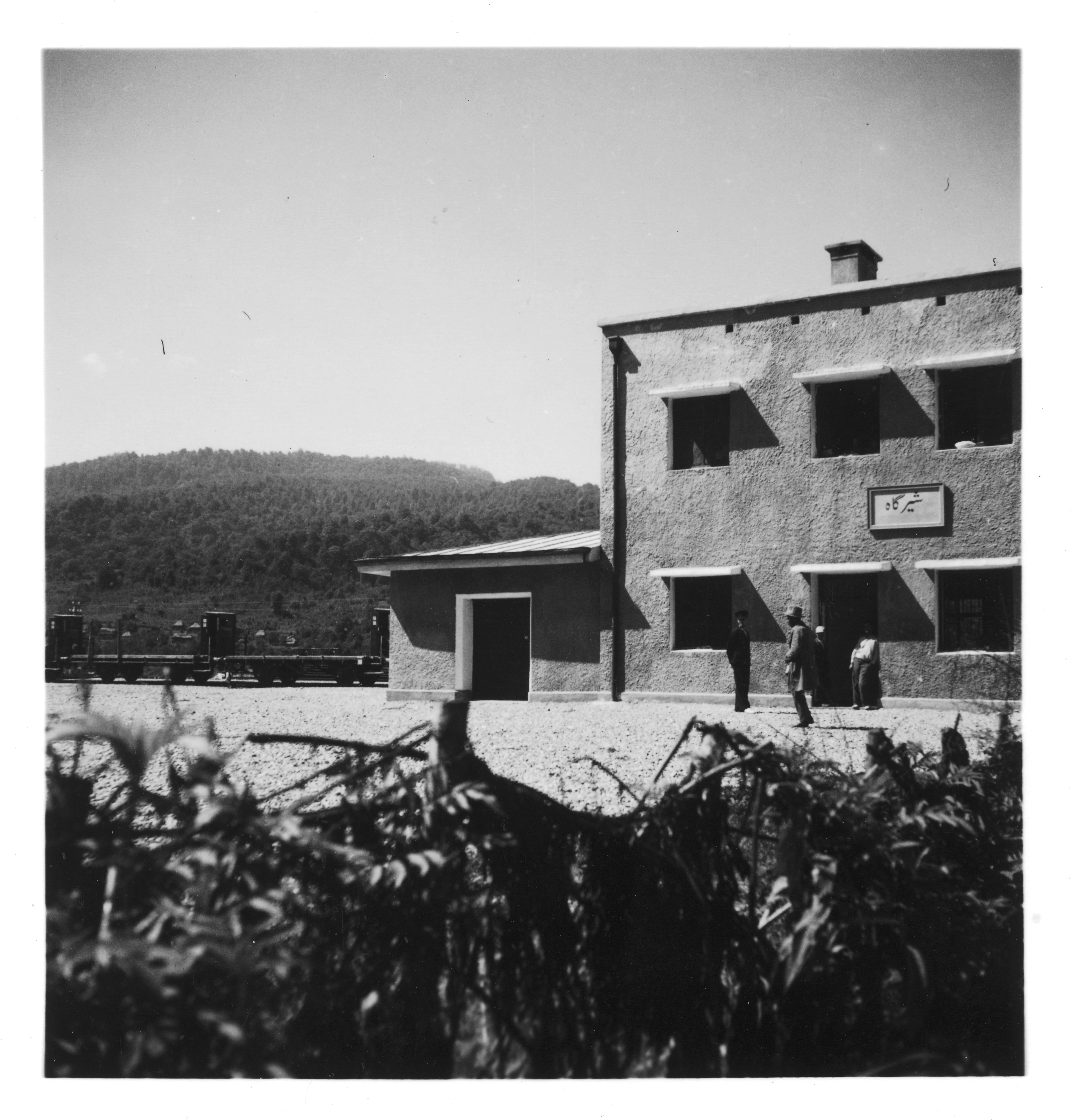 Persien, Firuskuh (Firuzkuh) im Elburs-Gebirge (Elburz): Gebäude; Bahnhofsgebäude